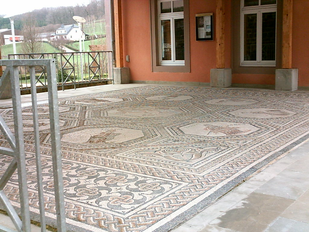 Kopie des römischen Mosaiks in Vichten, selbst fotografiert, April 2006, --Xocolatl 03:01, 22 April 2006 (UTC)